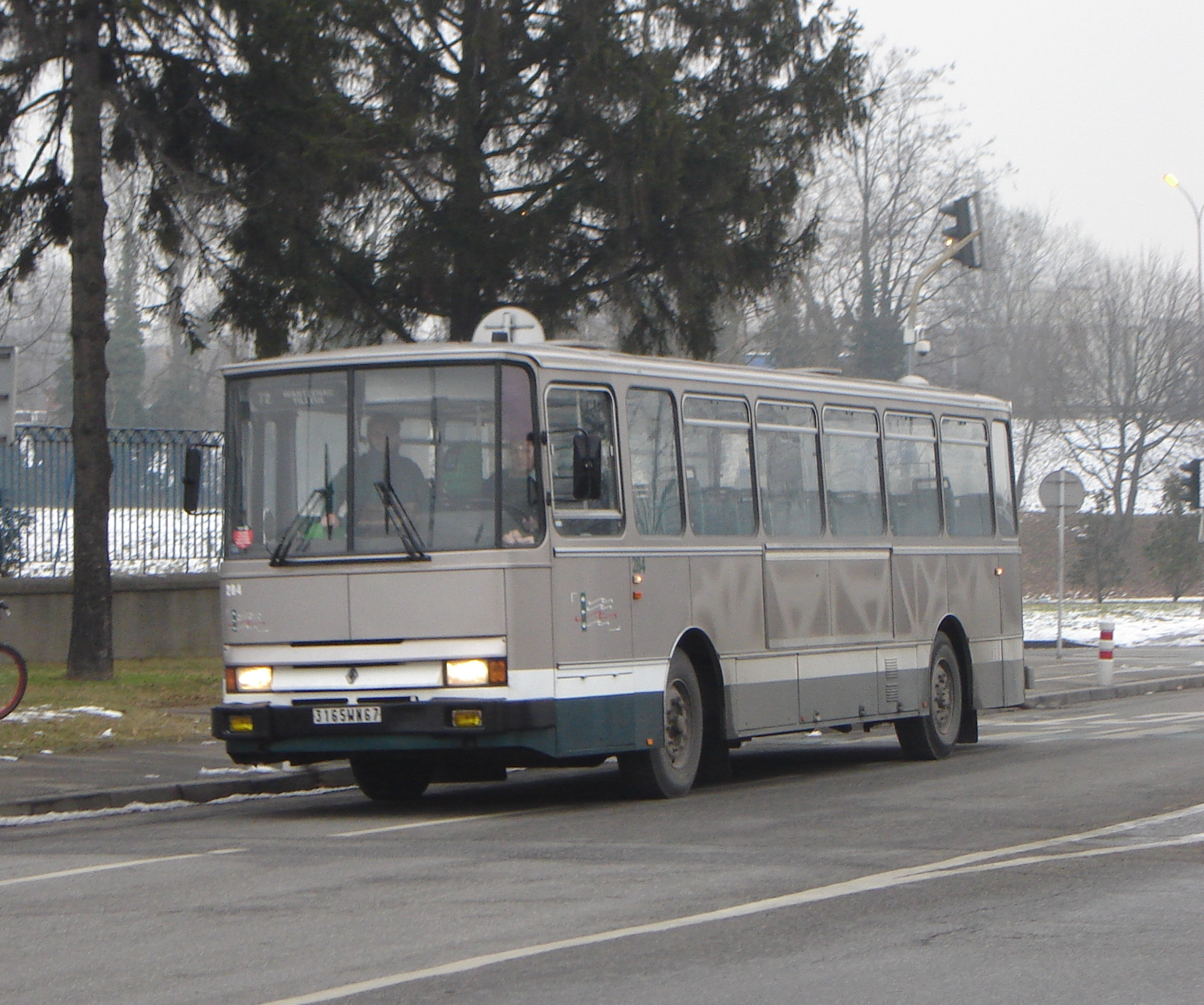 Renault S 53 à Strasbourg en 2006